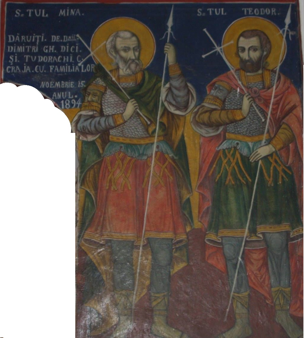 Фреска во црквата „Св. Преображение“ во битолското село Гопеш